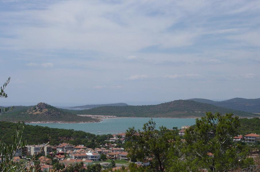 Kendi çektiğim bir fotoğraf.